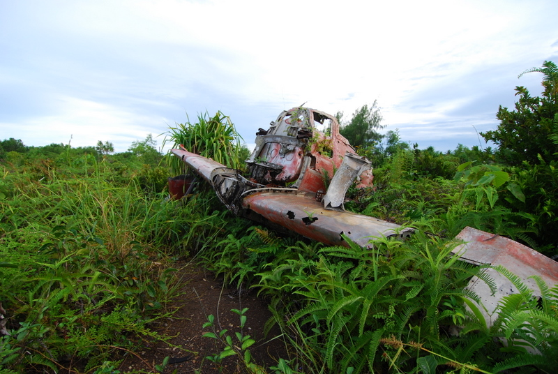 Zdjęcie japońskiego myśliwca Zero z okresu II Wojny Światowej na starym lotnisku. Udostępnione przez Najlepsze Nurkowania, autor: Bartosz Cieślak, wykonano 10-2007